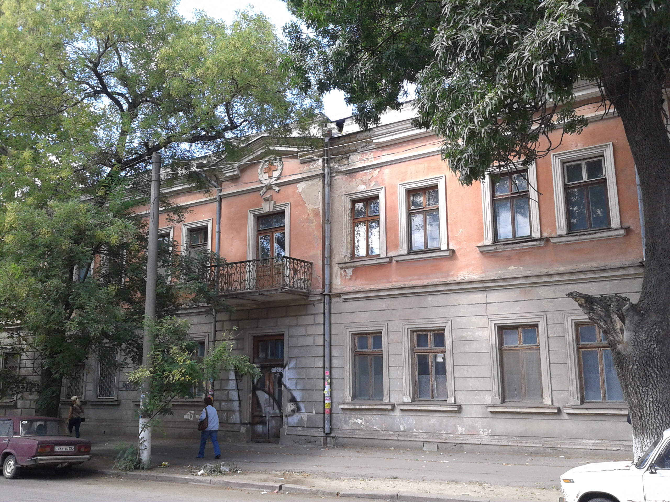 Лікарня Російського товариства Червоного хреста, Херсон, Бєлінського вул., 6